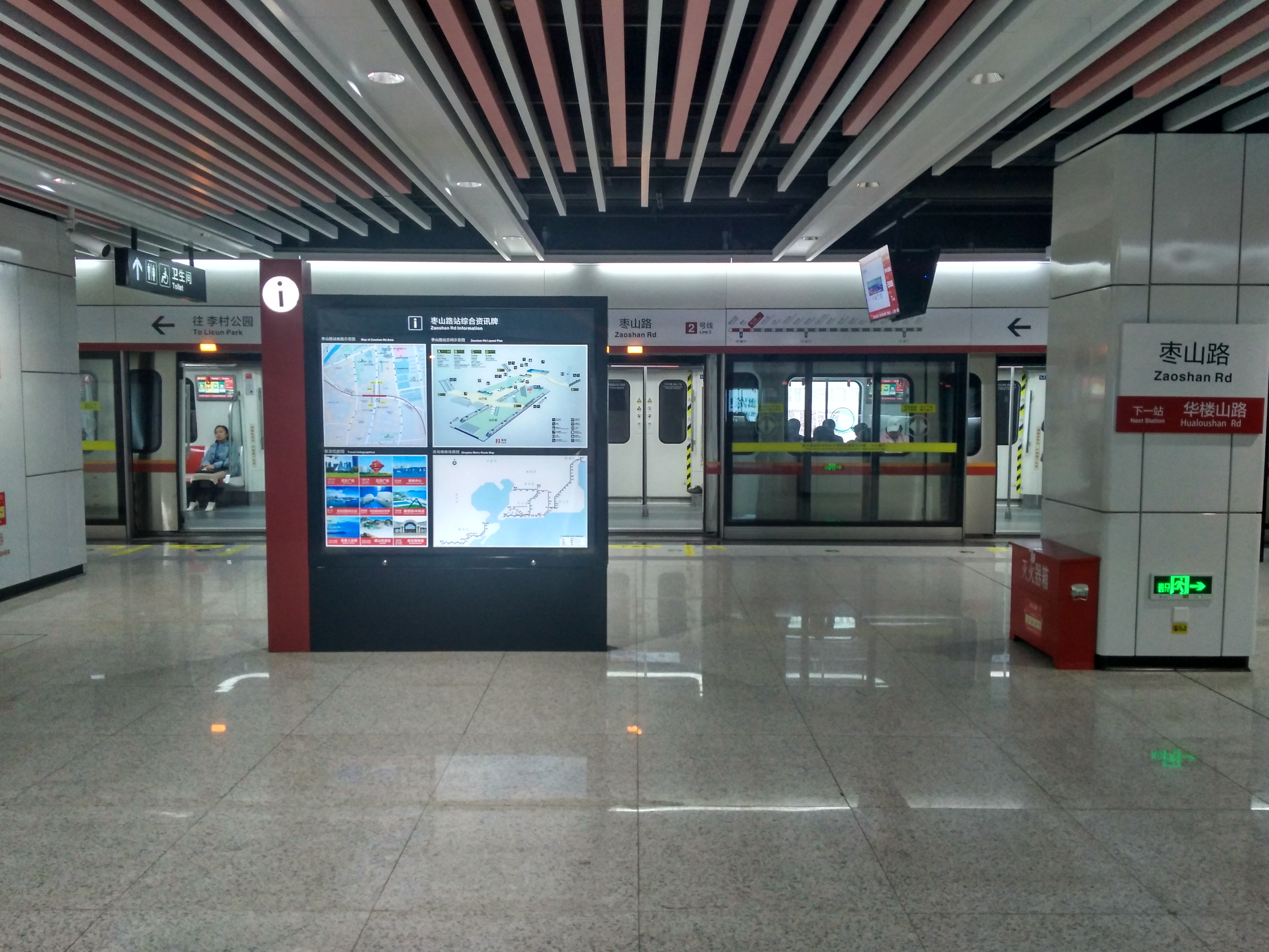 枣山路站站台